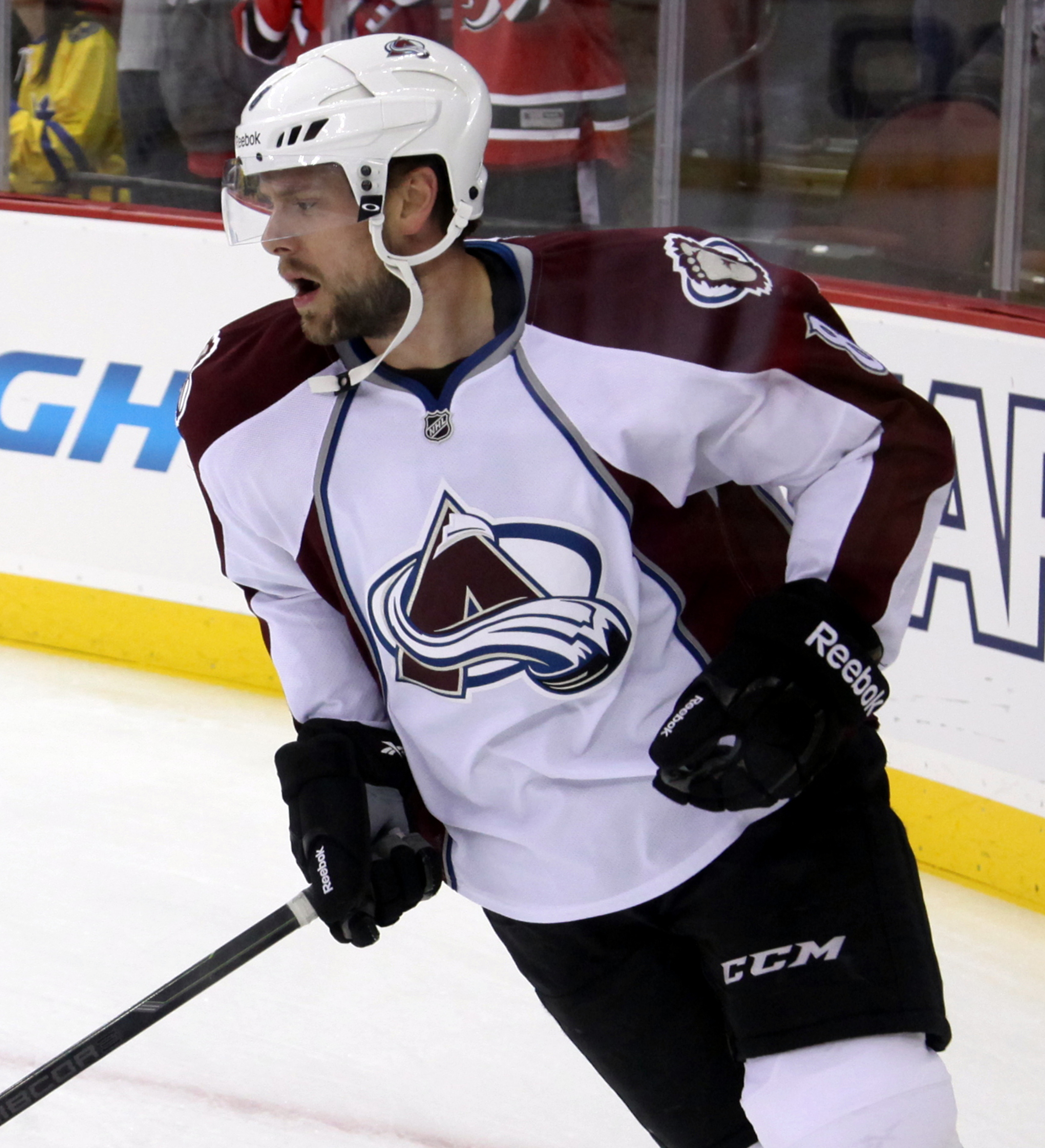 Hejda in November 2014.